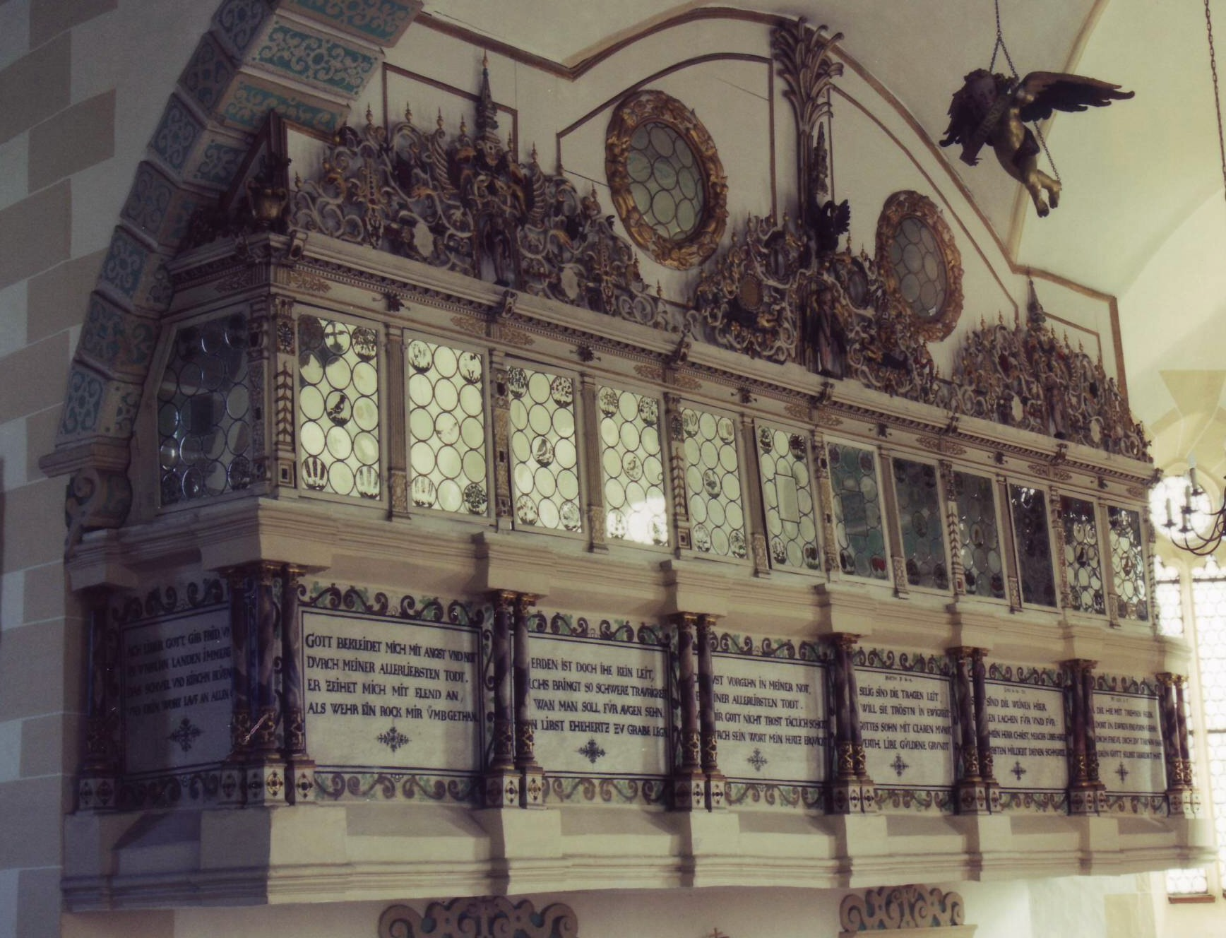 Patronatsloge St. Annenkirche zu Prießnitz (Sachsen)